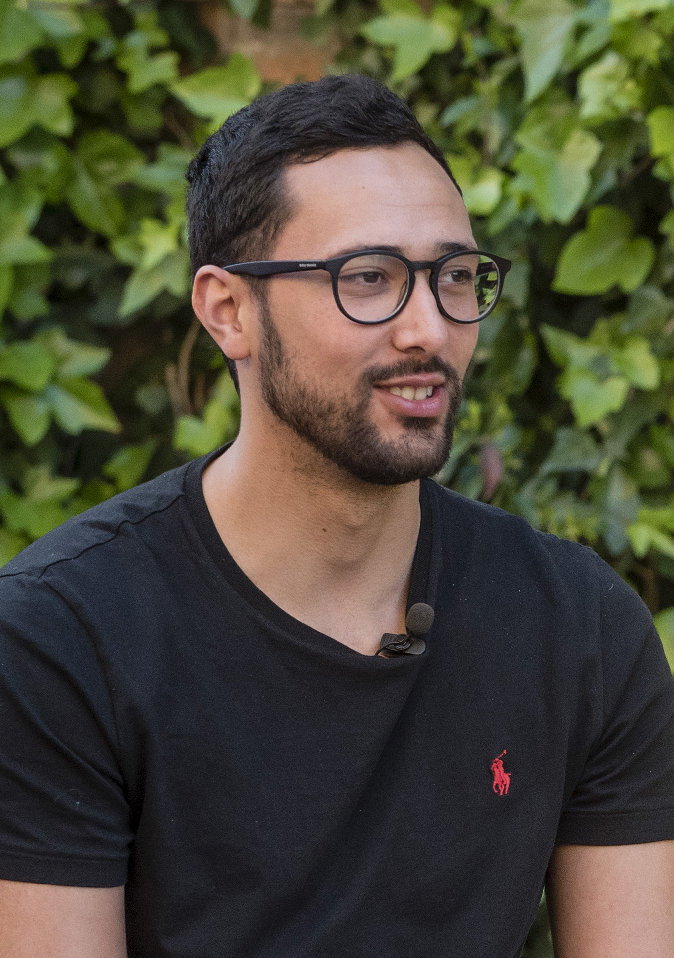 _DC71147